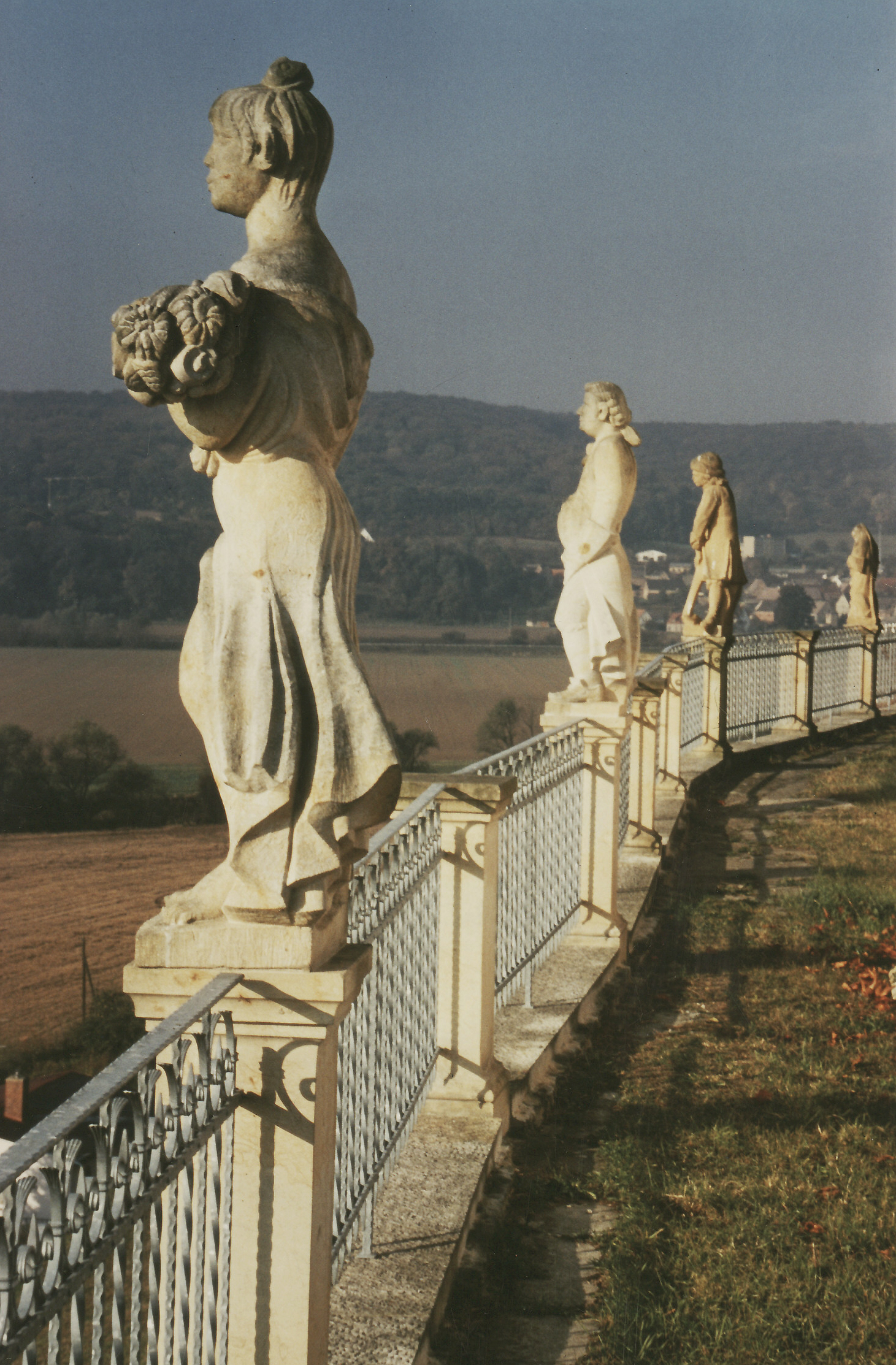 Großjena, Steinauer Weinberg, Balustrade, Skulpturen